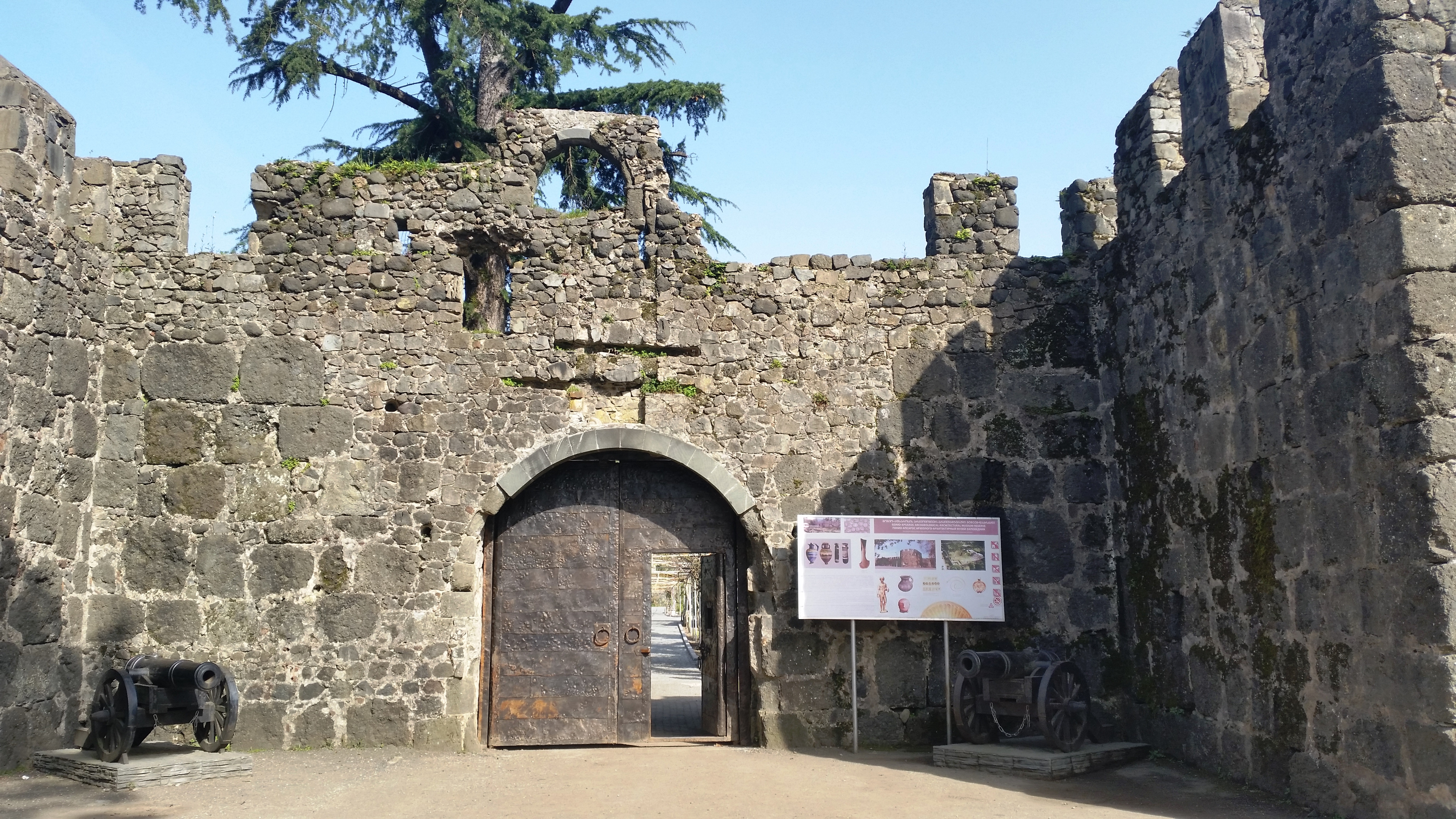 გონიოს ციხის ალაყაფი